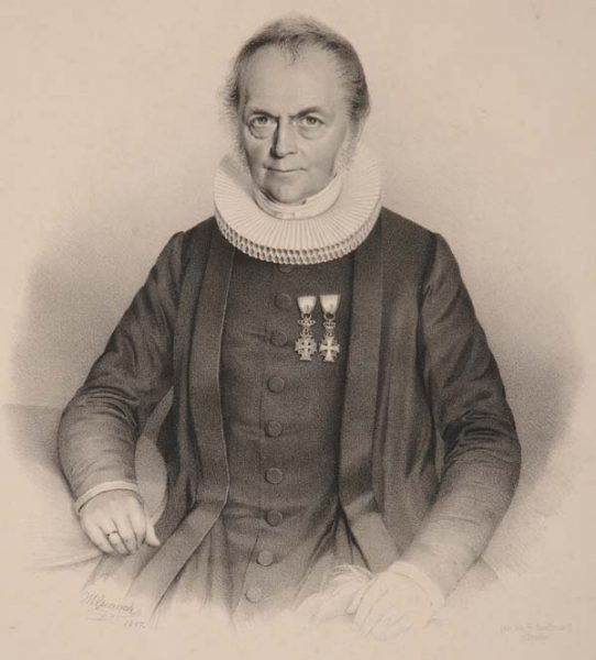 Valentin Peter Seidelin (1781-1863), Danish priest